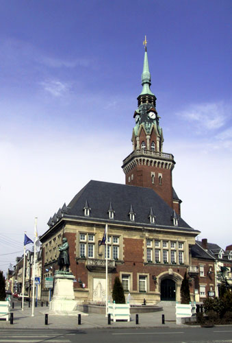 Le beffroi de Bapaume. Photo personnelle domaine public